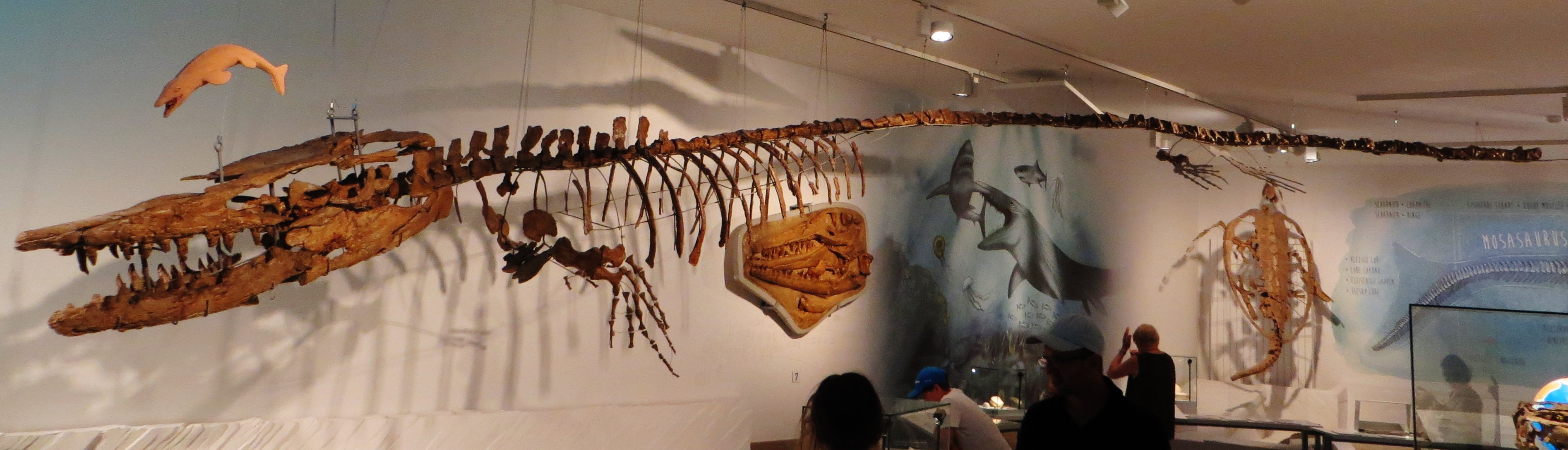 Fossil - Took The picture at Royal Belgian Institute of Natural Sciences, Brussels